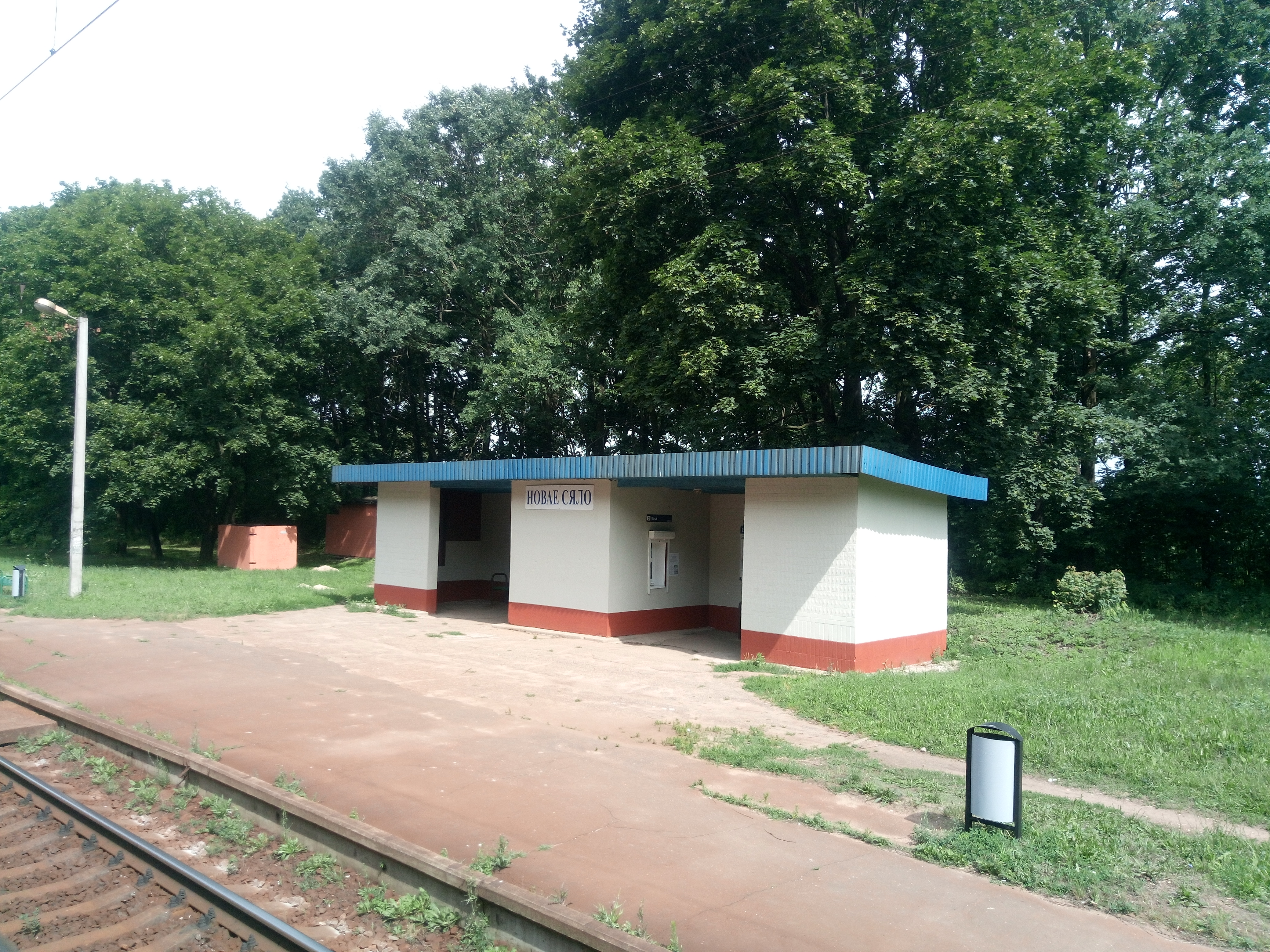 Прыпыначны пункт